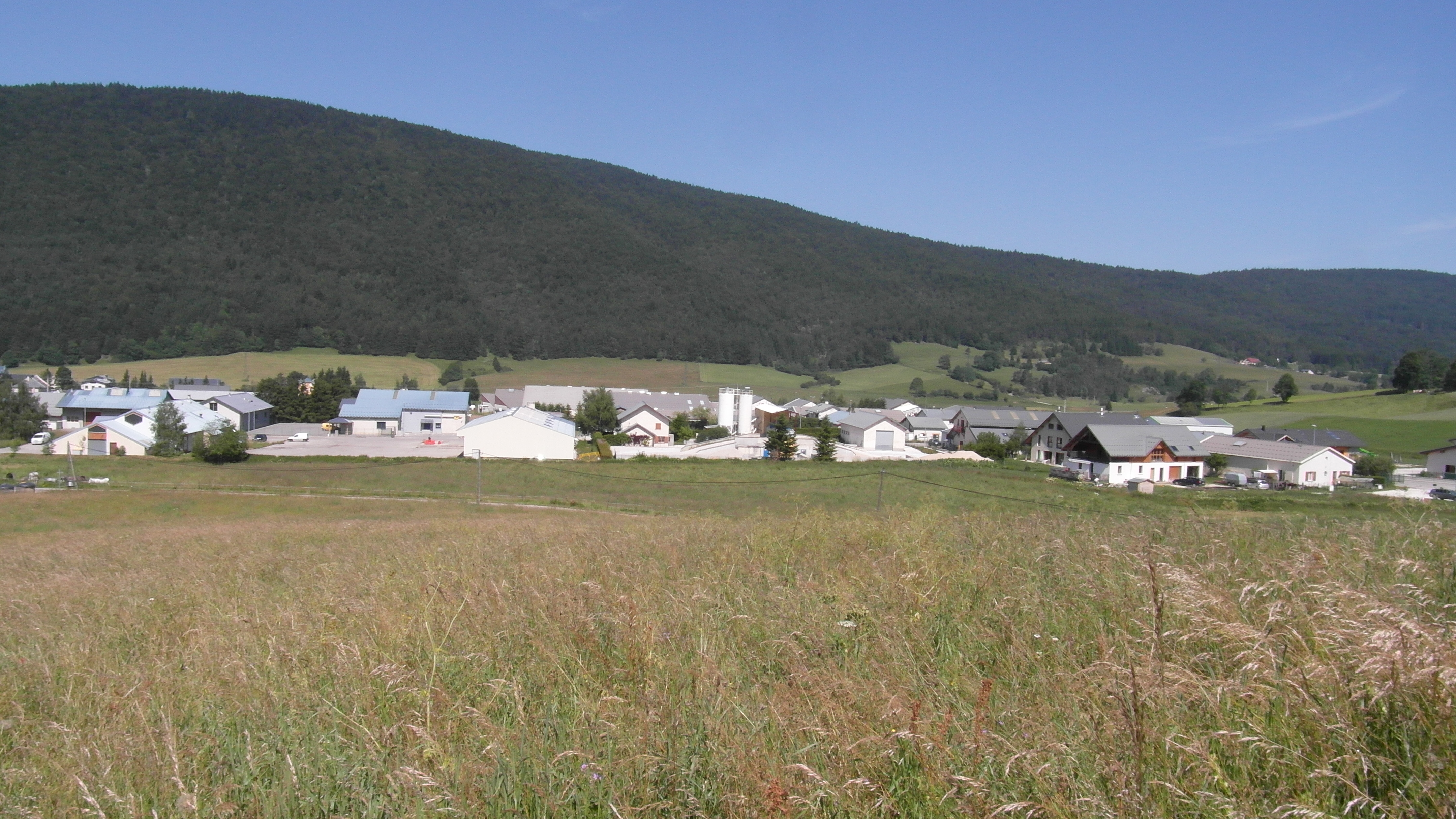 ZA les geymonds